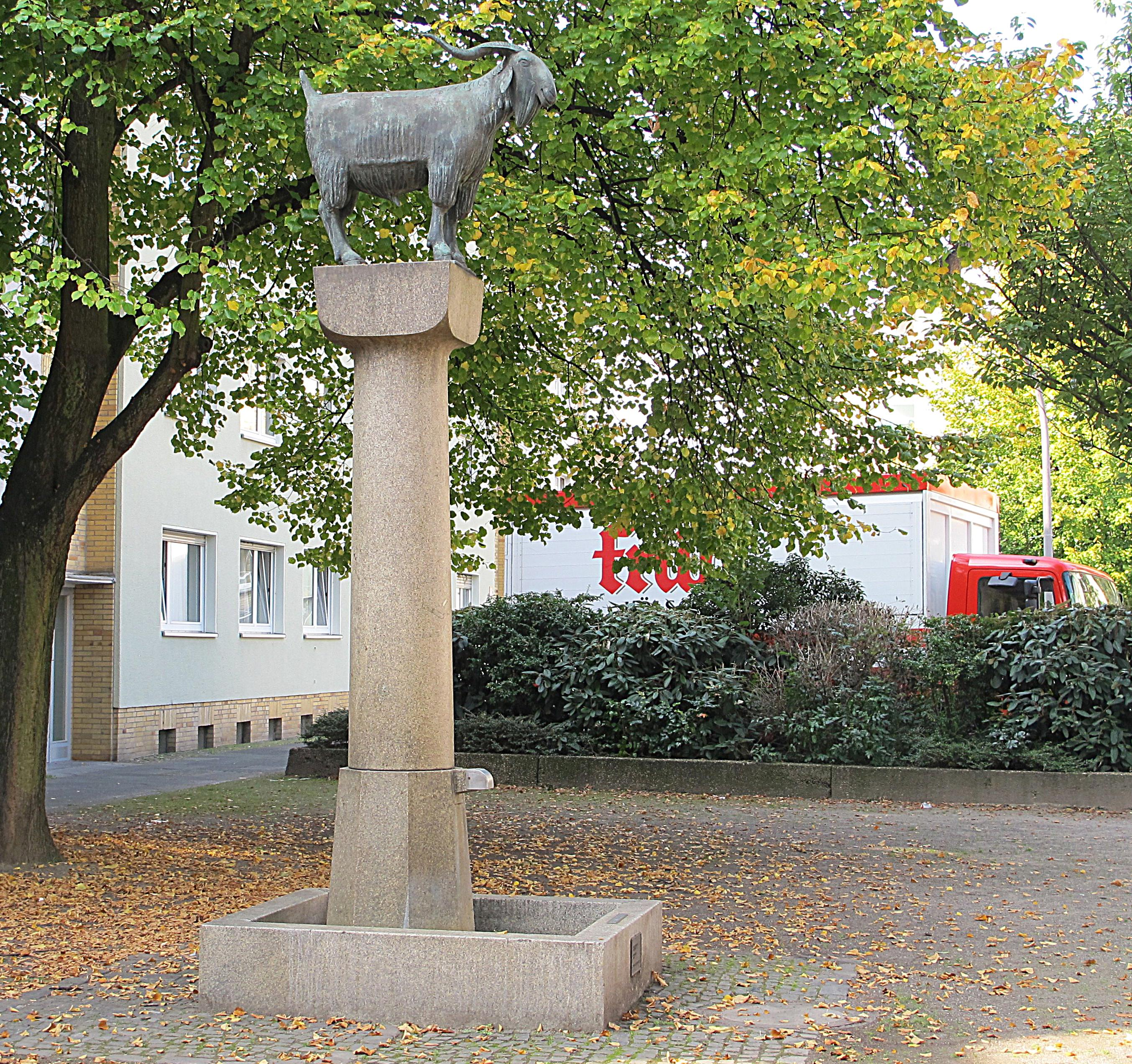 Düxer Bock, Brunnen Köln-Deutz, LorenzstrThis is a photograph of an architectural monument.